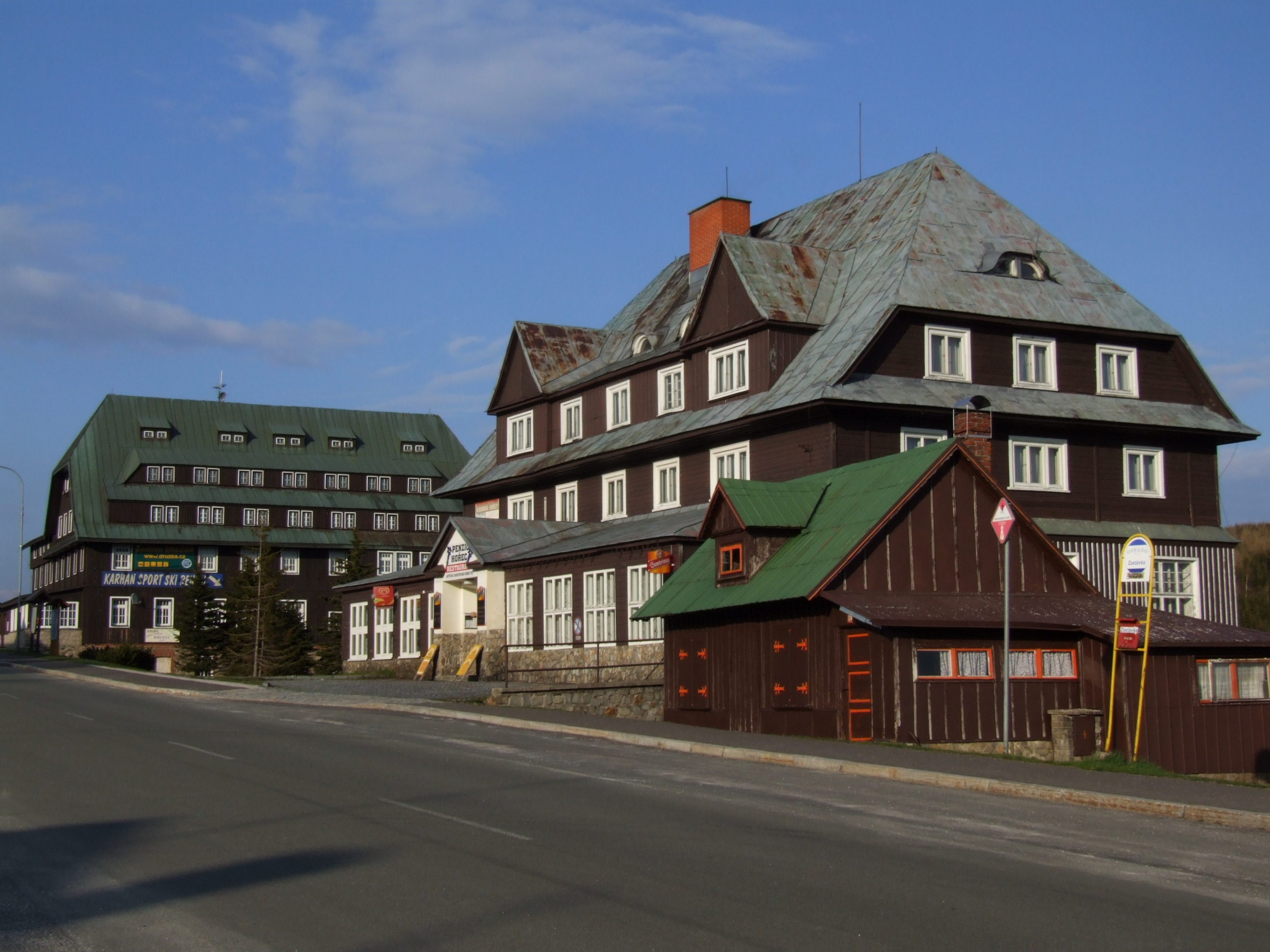 Village Malá Úpa in Czech Republic. Hotel Druzba and Penzion Horec